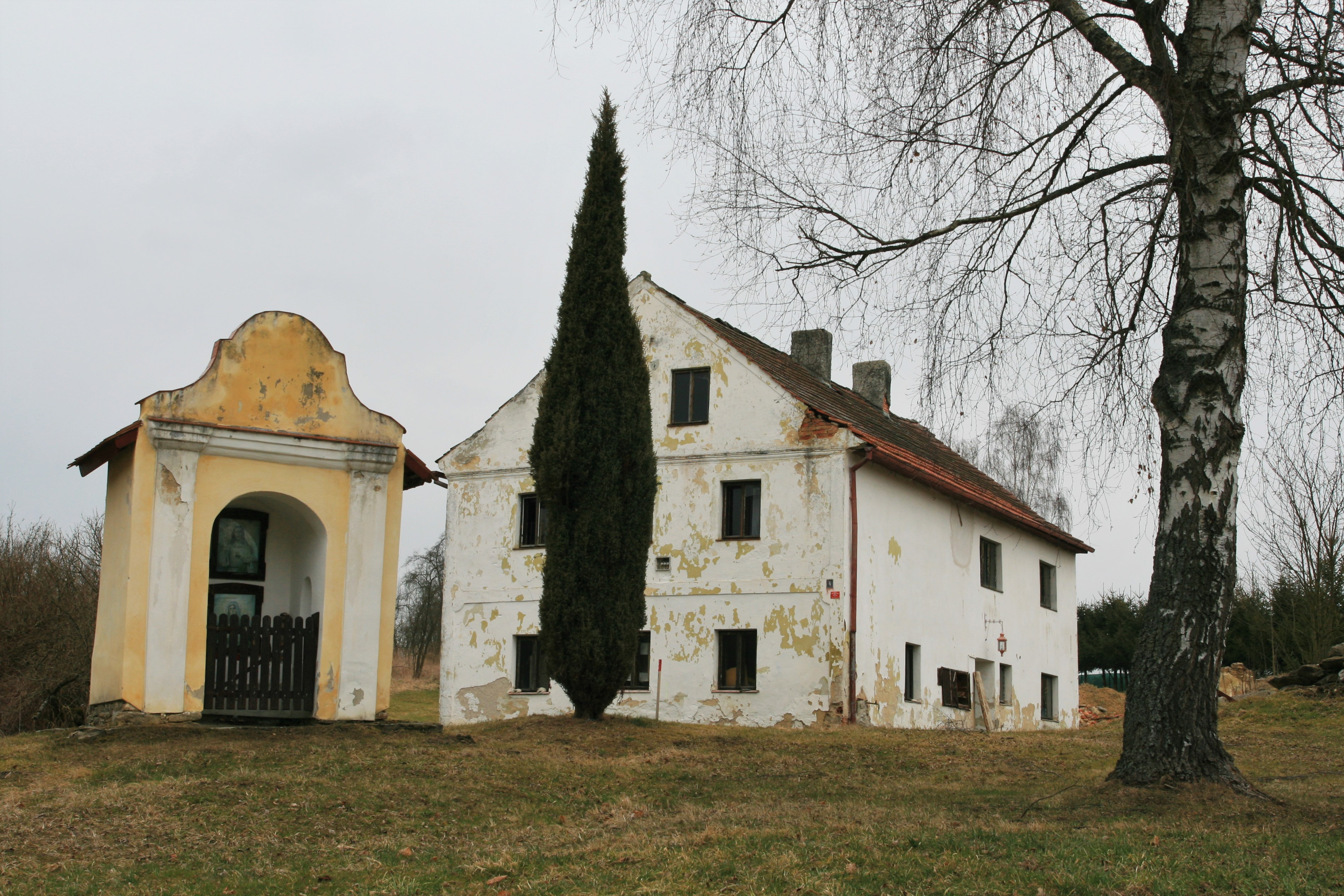 Vesnice Zdíky, část obce Bujanov v okrese Český Krumlov. Výklenková kaplička na návsi u domu č. 4.